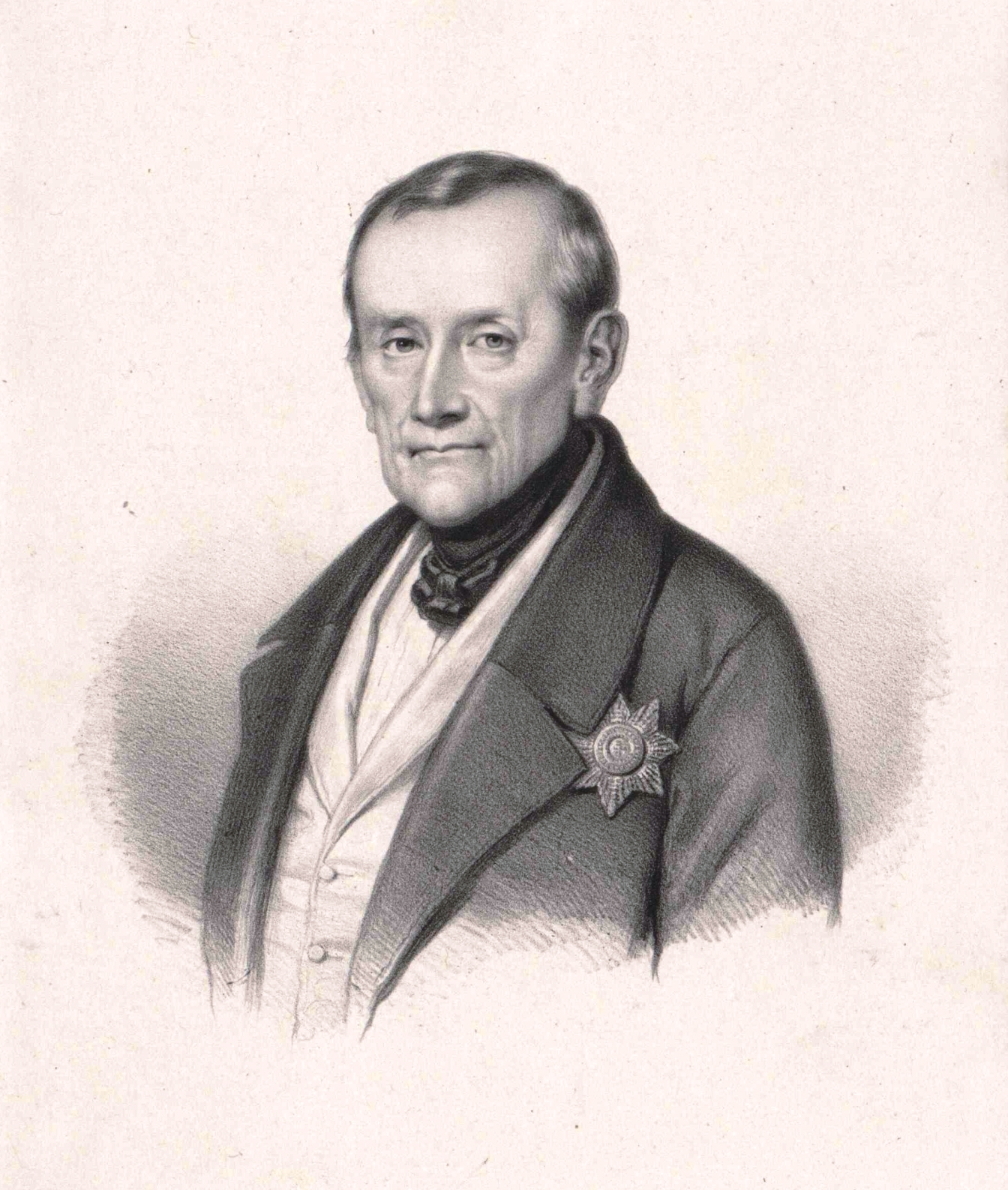 Ludwig Senfft von Pilsach (1774-1853), Diplomat, österreichischer Gesandter in München